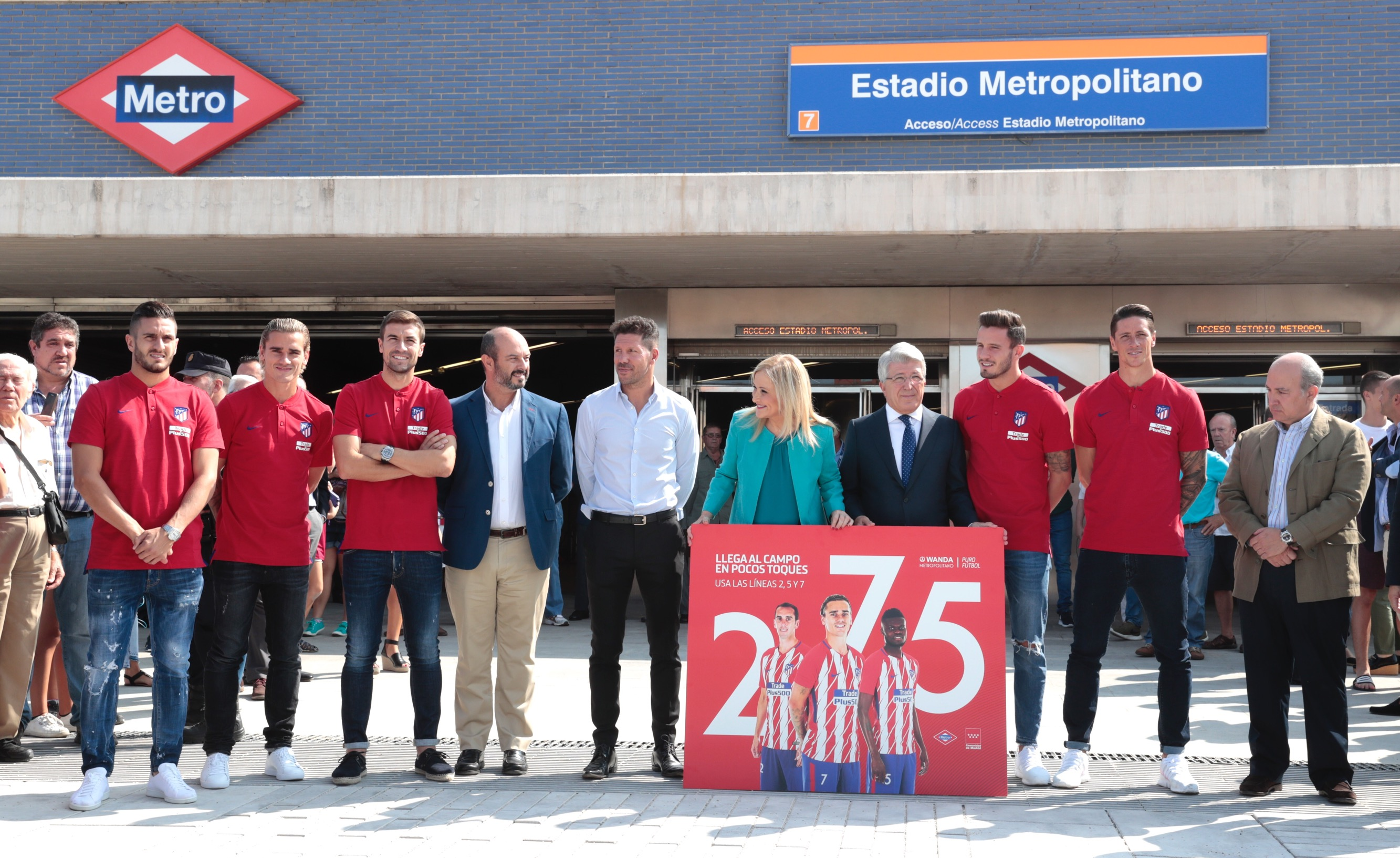 La estación de Estadio Metropolitano está preparada para facilitar el desplazamiento a las miles de personas que asistirán el próximo día 16 al partido inaugural del nuevo feudo rojiblanco. Una estación en la que los seguidores del Atlético de Madrid se encontrarán como en su casa y podrán observar cómo la historia de Metro está ligada a la de los estadios de su equipo, admirar los diferentes escudos que ha lucido el Atlético de Madrid y disfrutar con la iluminación de los colores rojiblancos. ¡Aúpa Atleti!